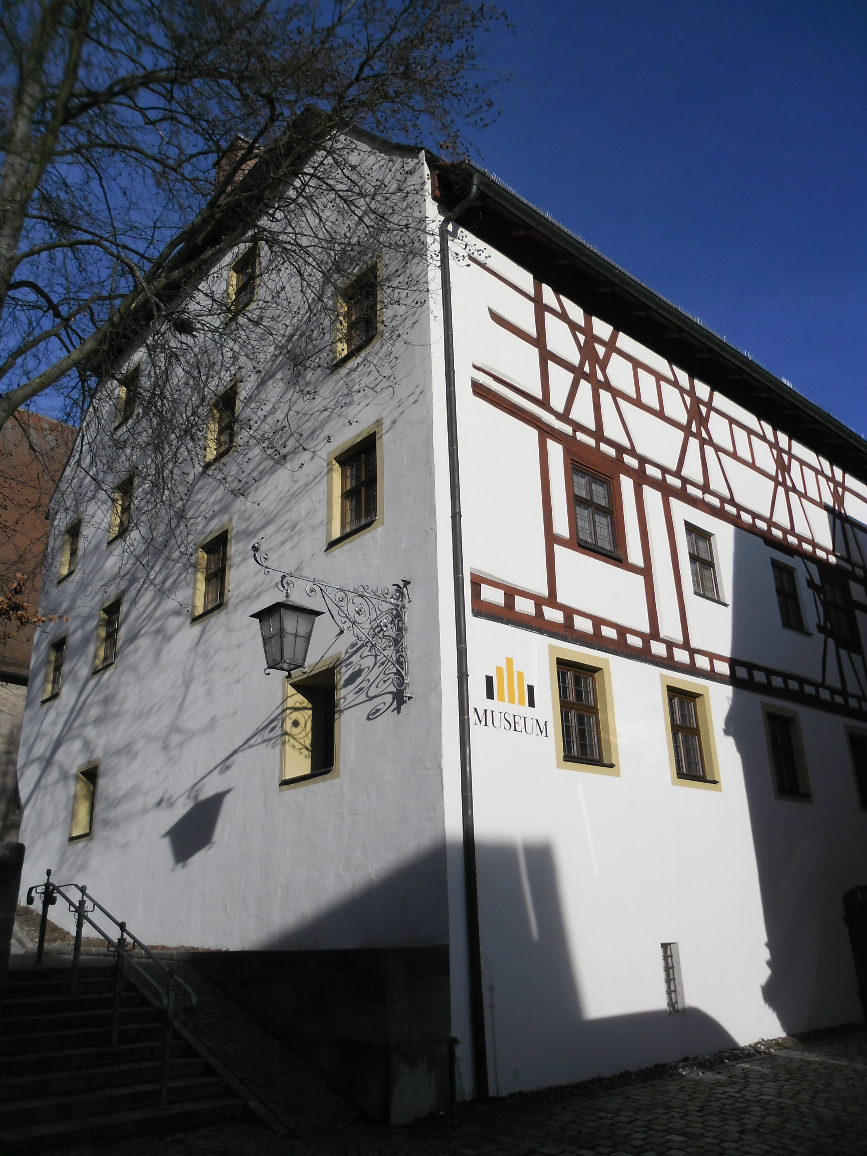 Das ehemalige Spital am Kirchenplatz 2 wurde 1506 bezogen und beherbergt heute das Herzogenauracher Stadtmuseum.